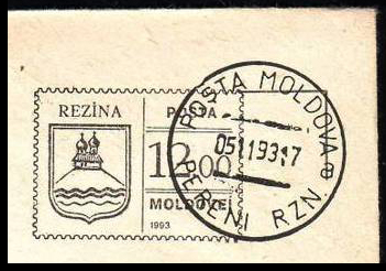 Штемпель-марка города Резина (Молдавия)